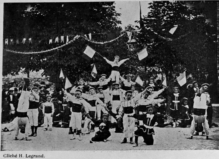 extrait du "bulletin de l'œuvre des voyages scolaires".